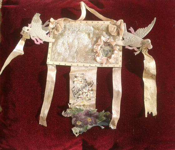 Tarjeta de felicitación del día de San Valentín. Años 20 del S.XX.